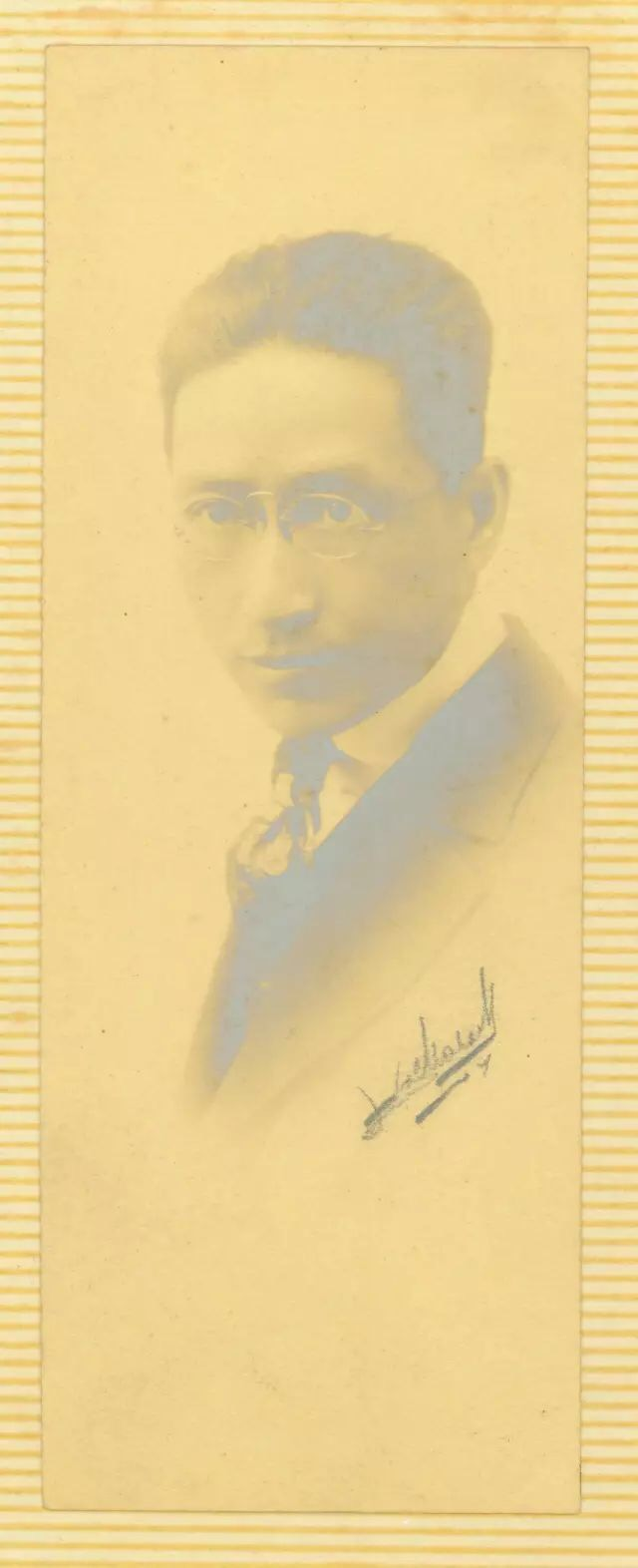 李鐵夫美國時期簽名照片